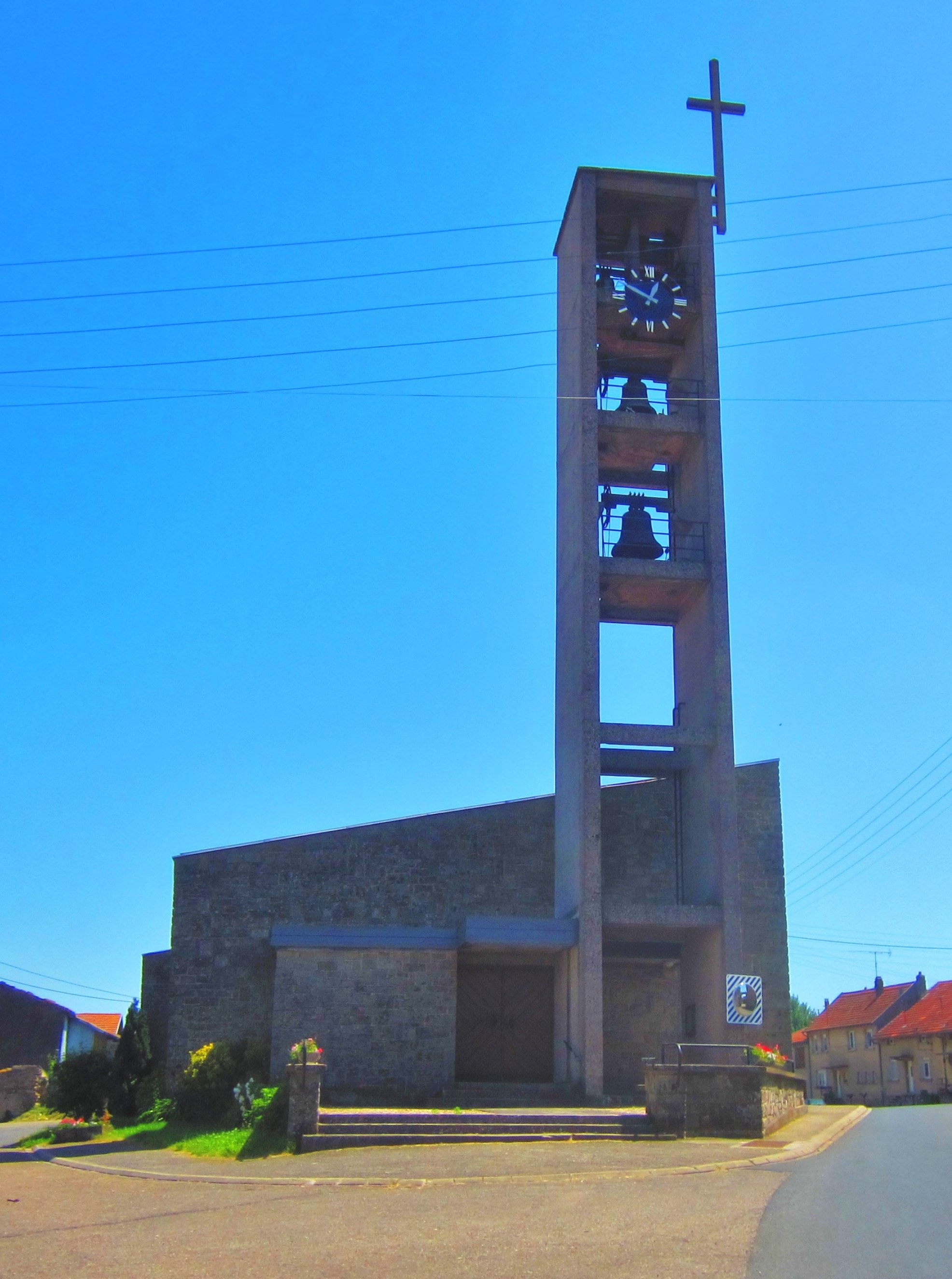 Eglise Bourdonnay (1)